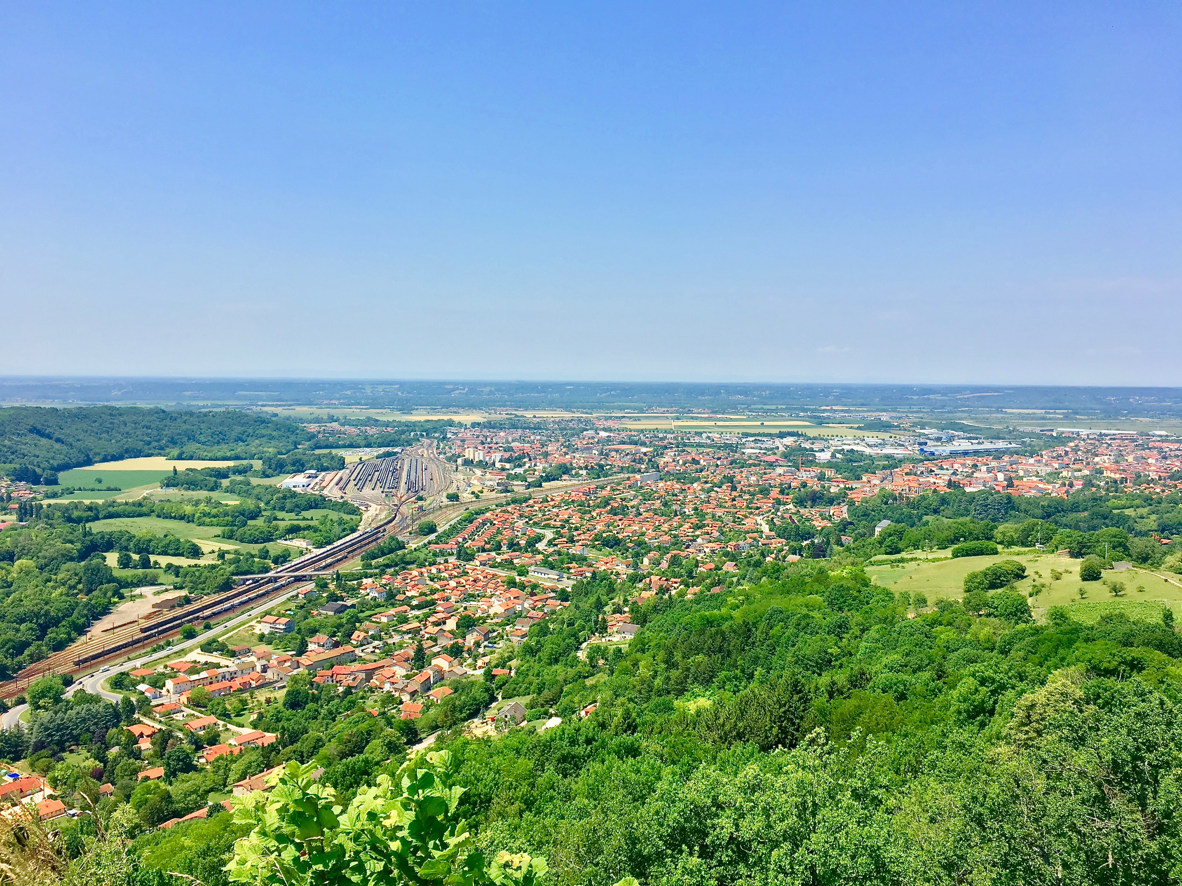 La plaine d'Ambérieu, la gare de triage et au loin la plaine de l'Ain vues du Château de Saint-Germain à l'est de la ville un jour clair et dégagé. On voit bien l'emprise de la gare et des rails et comment la ville s'est développée des collines vers le bas dans la vallée. Photo prise des hauteurs autour des ruines du château de Saint-Germain. Photo personnelle prise avec un iPhone 6S.